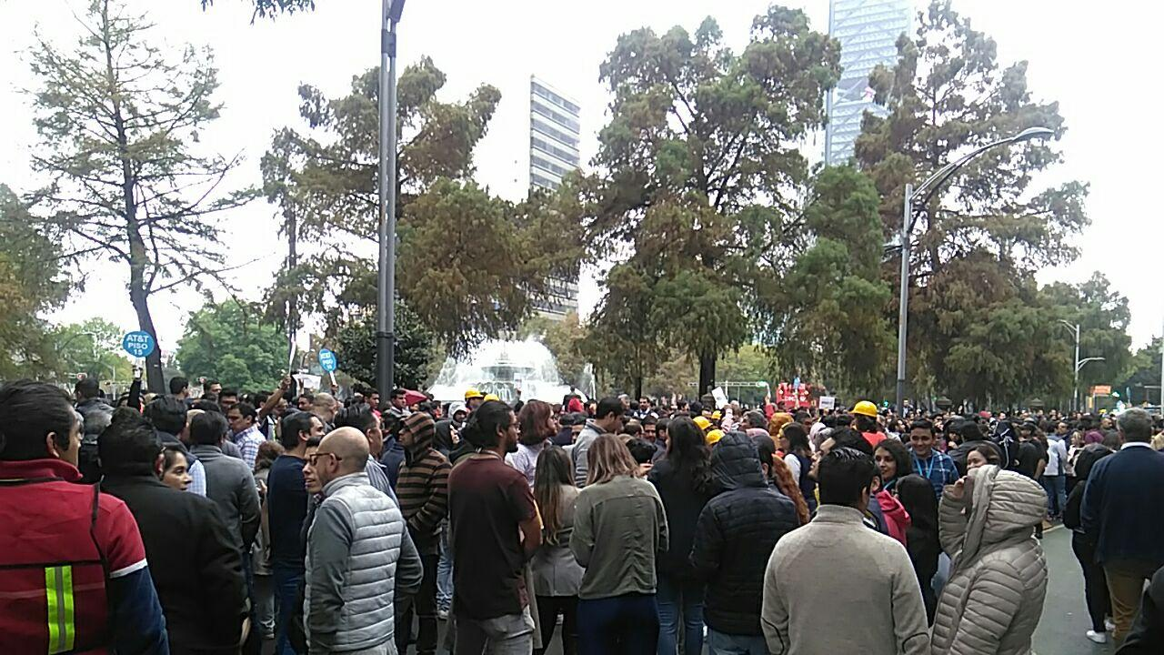 Realización de simulacro de sismo en Ciudad de México